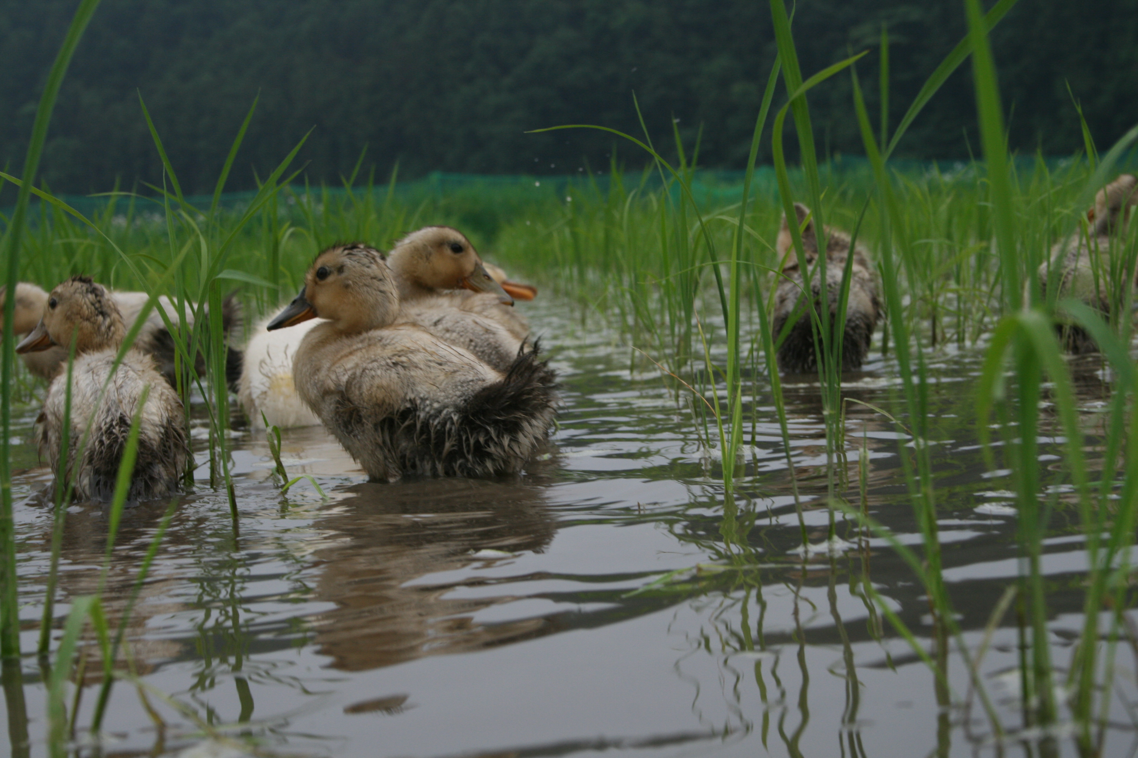 水稲作において、アイガモを利用した減農薬もしくは無農薬農法。